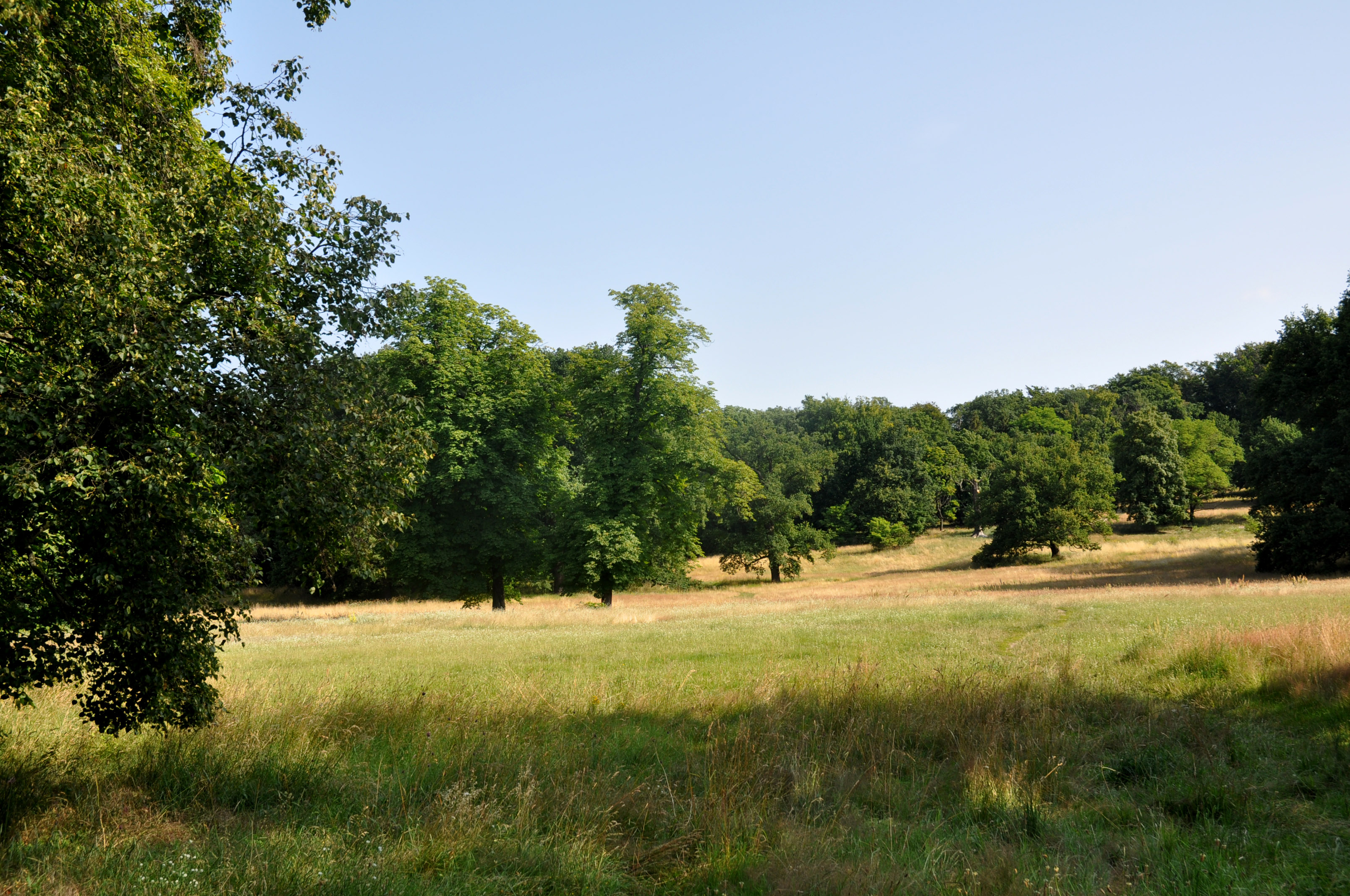 Der Große Wiesengrund vom Süddrive